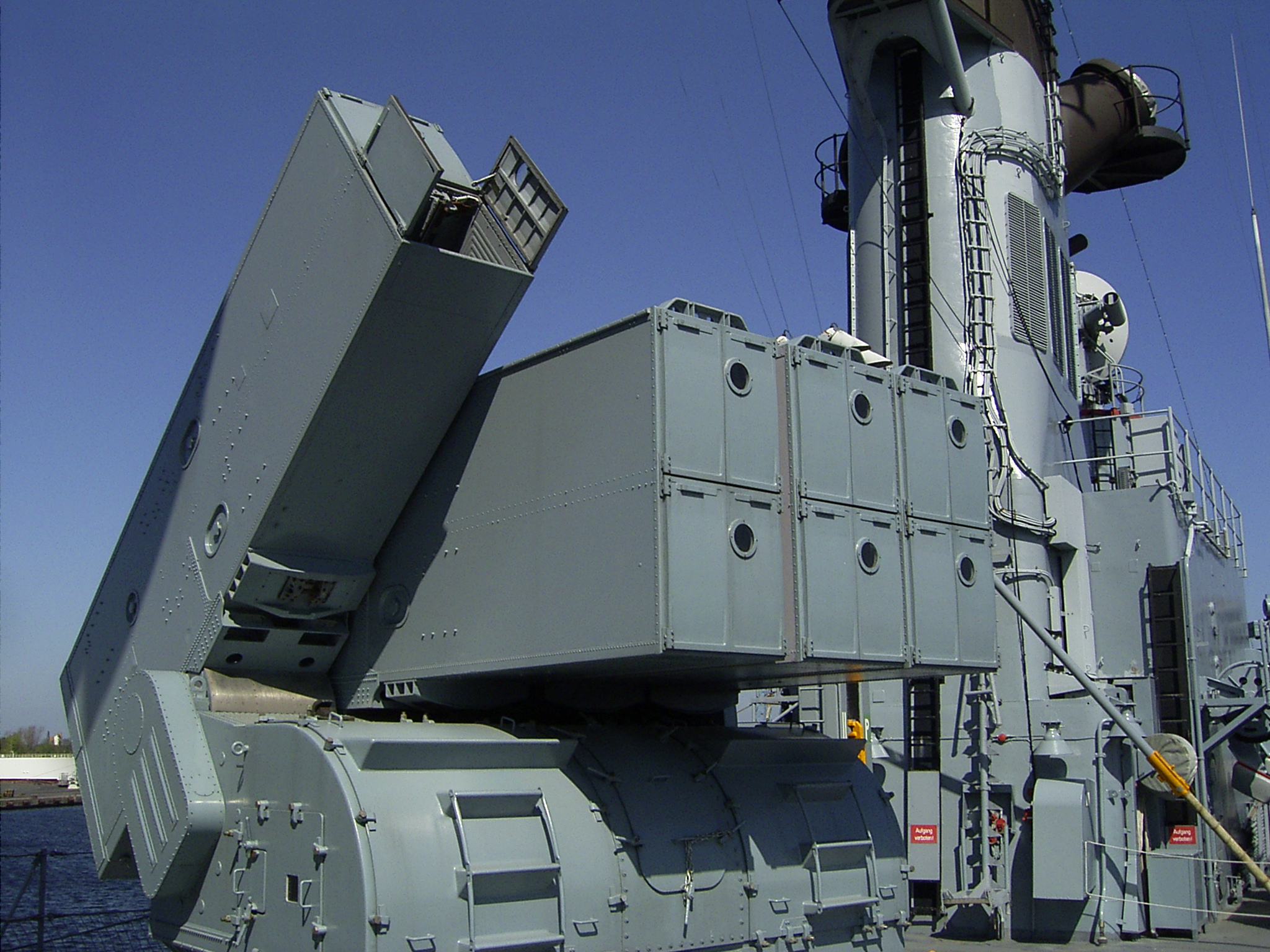 ASROC U-Jagd-Torpedoraketen-Starter an Deck des Zerstörers "Mölders" im deutschen Marinemuseum Wilhelmshaven. Starter mit 8 Raketen. Reichweite etwa 9000 m (10000 yards). ASROC (Anti Submarine Rocket) Raketen bestanden hier aus einem MK 46 Jagdtorpedo und einem Raketentreibsatz, der nach abbrennen abgetrennt wurde. Der Torpedo wurde zum Eintauchen von einem Fallschirm abgebremst. Trotzdem tauchten die Torpedos so tief ein, dass ASROC in Nord und Ostsee nur bedingt einsetzbar war.